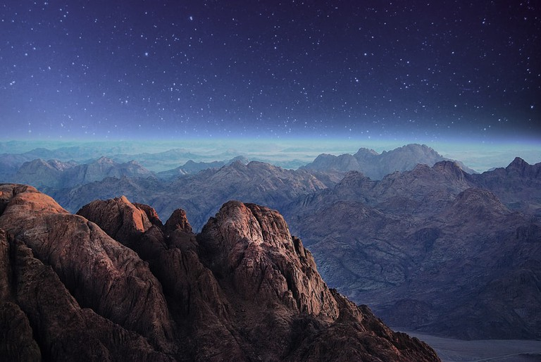 الطبيعة من أعلي جبل موسي